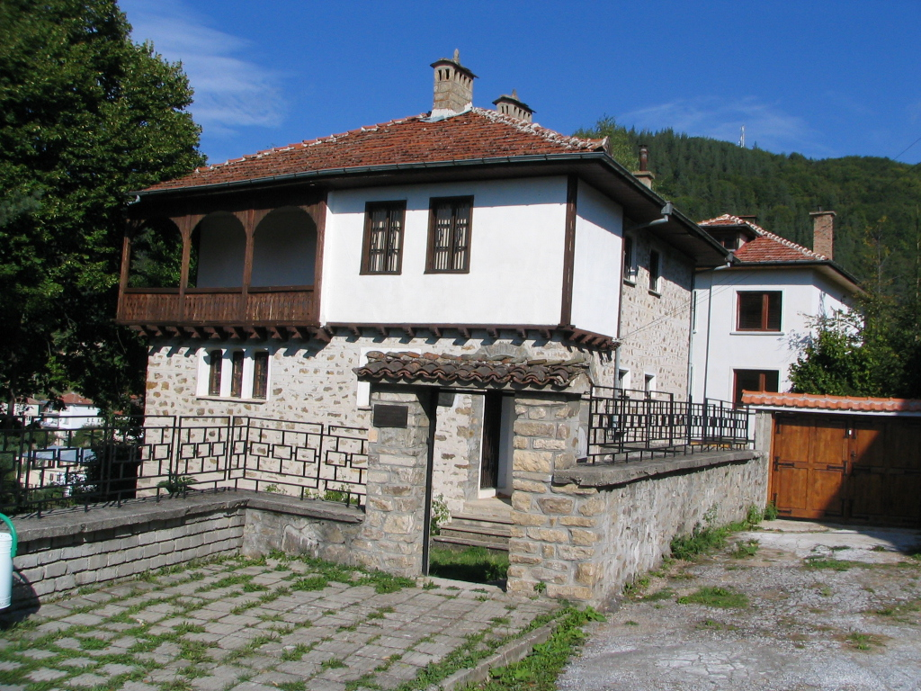 Къща музей проф. Константин Чилов